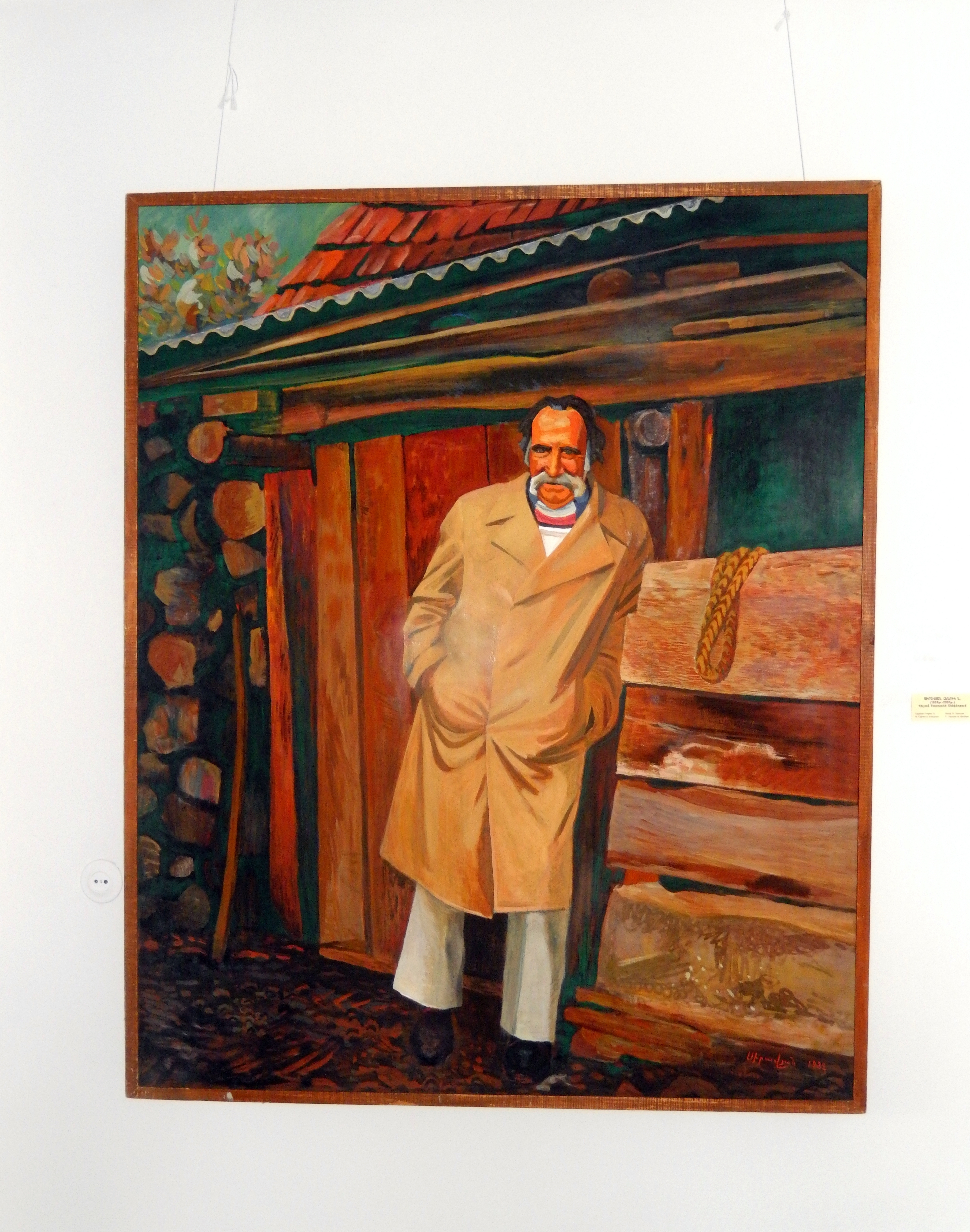 Վանաձորի կերպարվեստի թանգարան 1/49